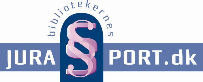 Logo for Bibliotekernes JURAPORT